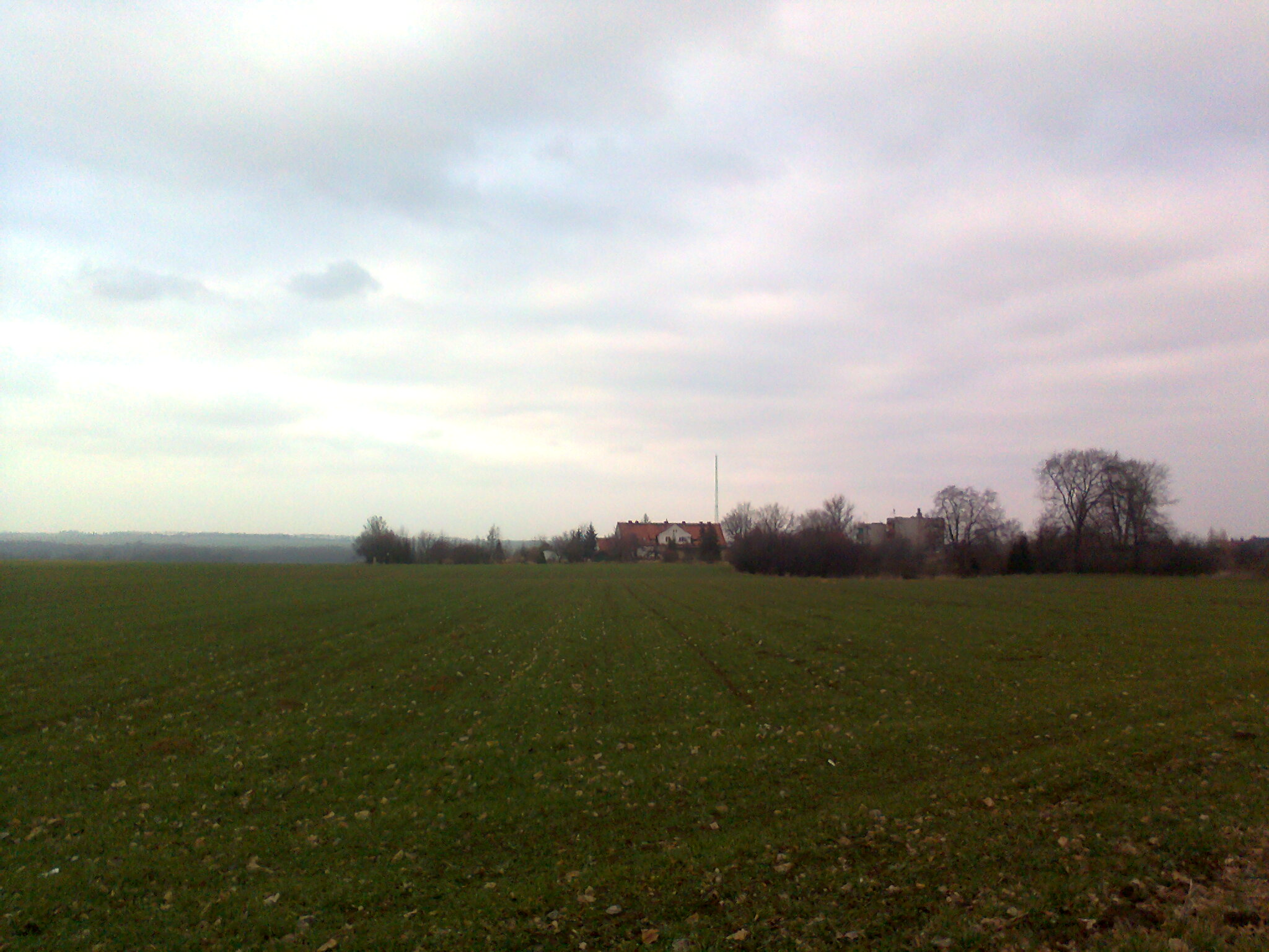 Pomorzowice, była Strażnica Wojsk Ochrony Pogranicza (WOP) Pomorzowice, następnie Strażnica Straży Granicznej (SG) w Pomorzowicach, od 24.08.2005 do 15.06.2006 roku placówka Straży Granicznej. Obecnie prywatne budynki mieszkalne